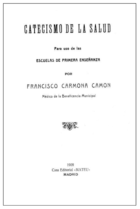 Portada del libro "Catecismo de la Salud", publicado en Madrid por Francisco Carmona Camón en 1909. Declarado útil para la enseñanza en las escuelas por Real orden del 19 de julio de 1909 del Ministerio de Fomento.[1]